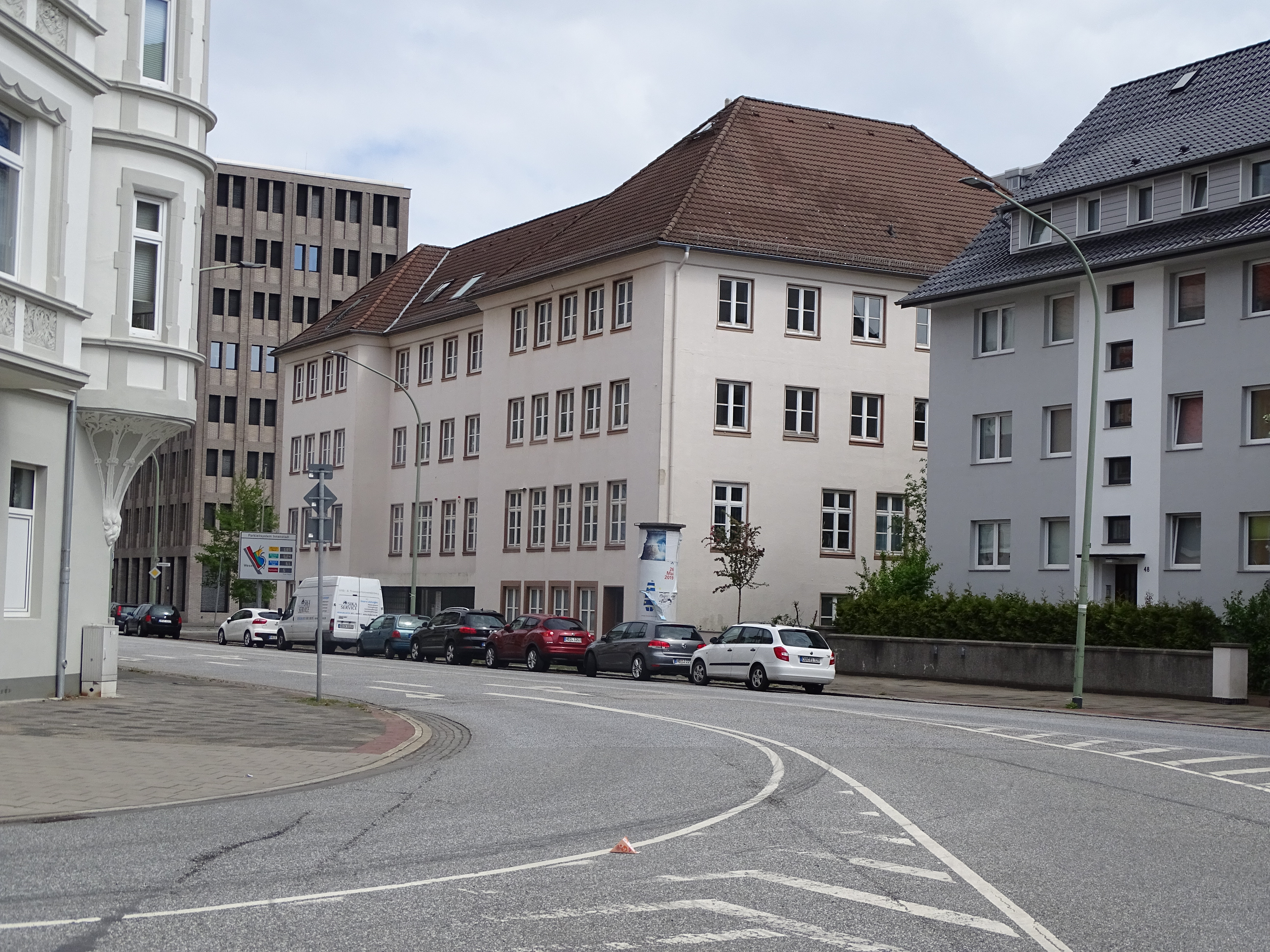 Gebäude der ehemaligen Kreisverwaltung von Wesermünde. Sie war dort bis zur Verlegung nach Cuxhaven untergebracht. Danach war erst das Amt für Agrarstruktur und dann bis heute das Katasteramt untergebracht.